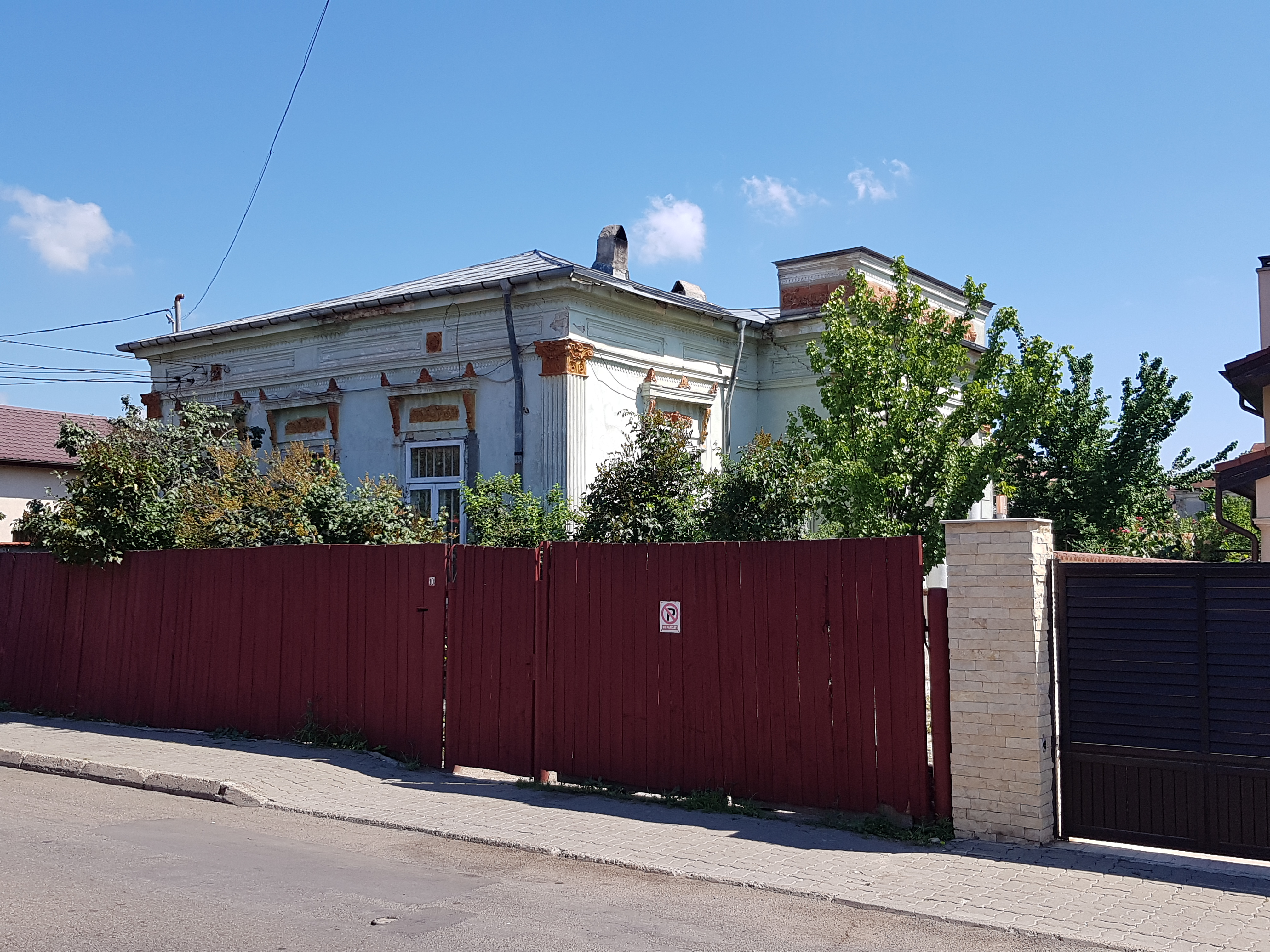 Casa Găgiulescu